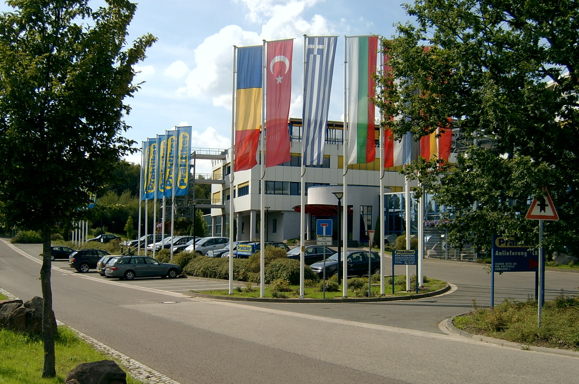 Die Zentrale der Praktiker Bau- und Heimwerkermärkte Holding AG in Kirkel.